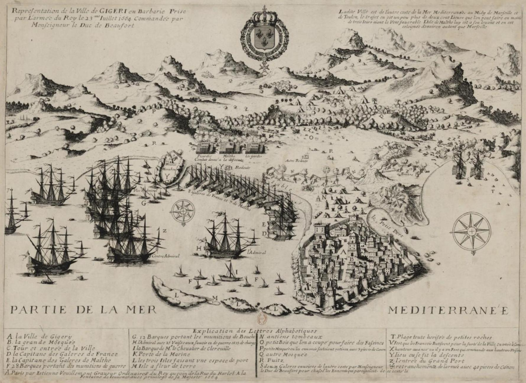 Gravure de 1664, mettant en scène le débarquement français et la prise provisoire de Gireri par une escadre française commandée par le duc de Beaufort.